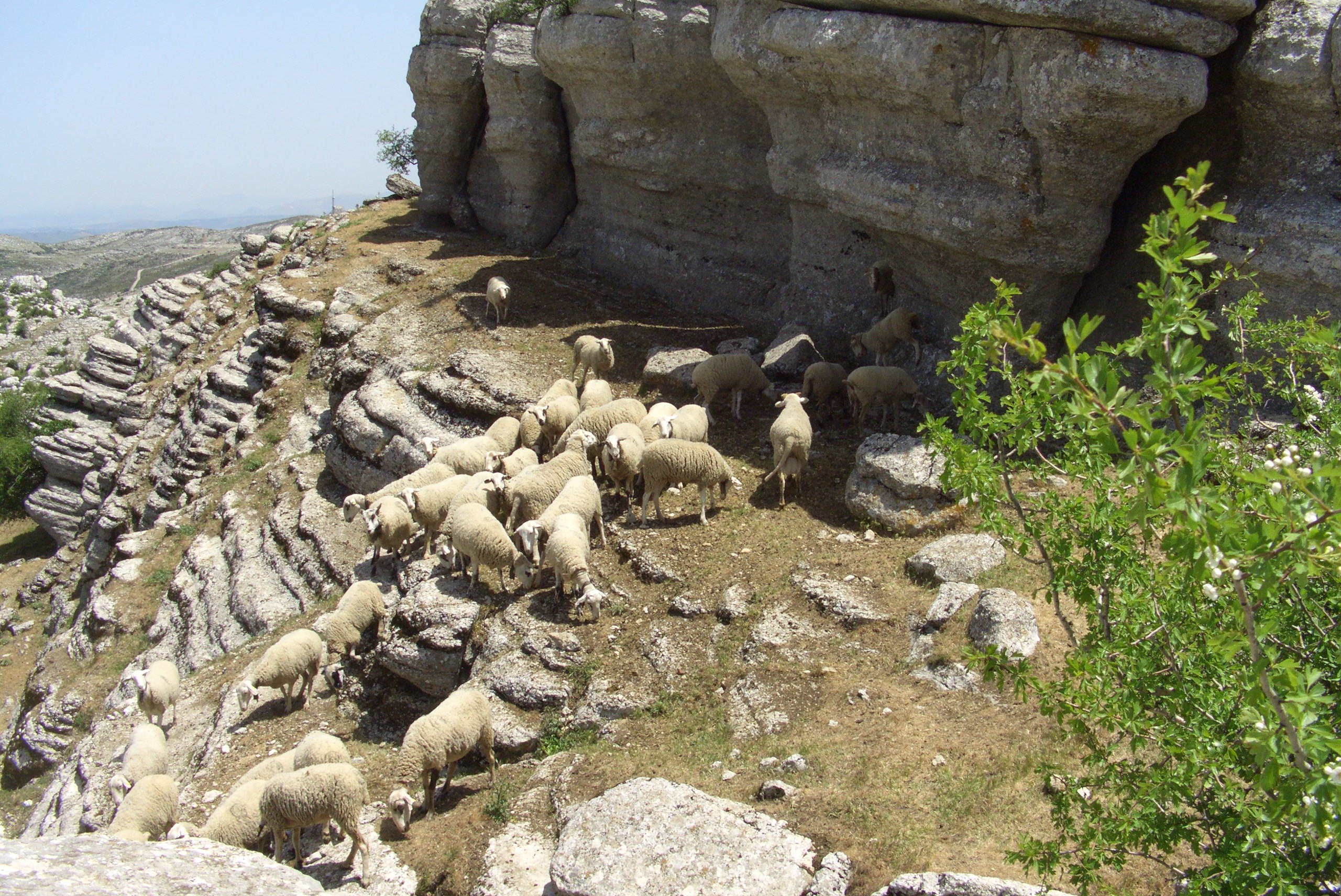 Landschaft in El Torcal, Spanien